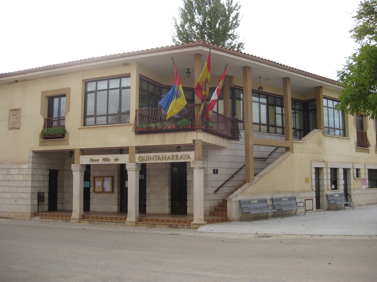 Casa-villa de Quintanarraya (Burgos, España)